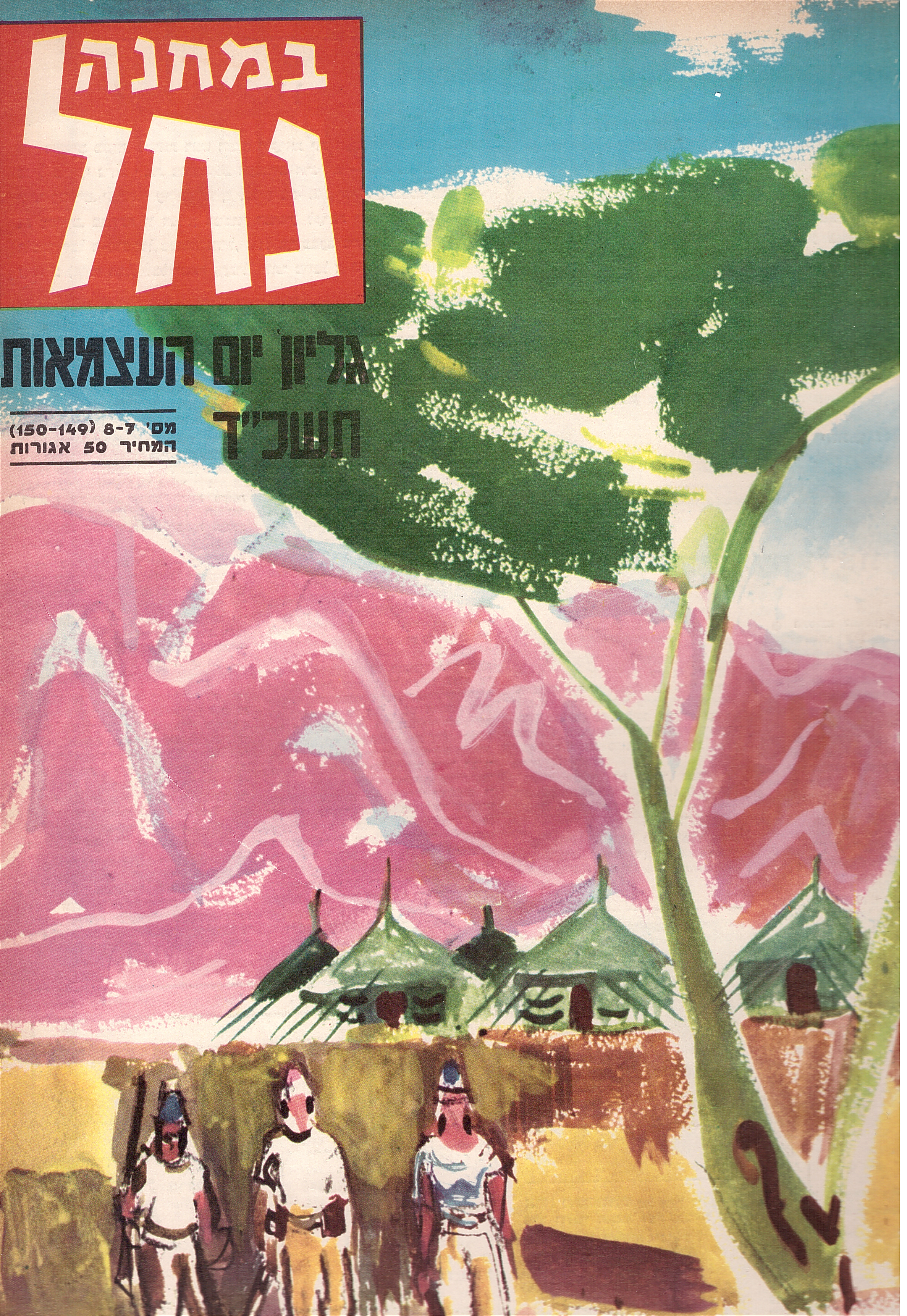 Bamahane Nahal